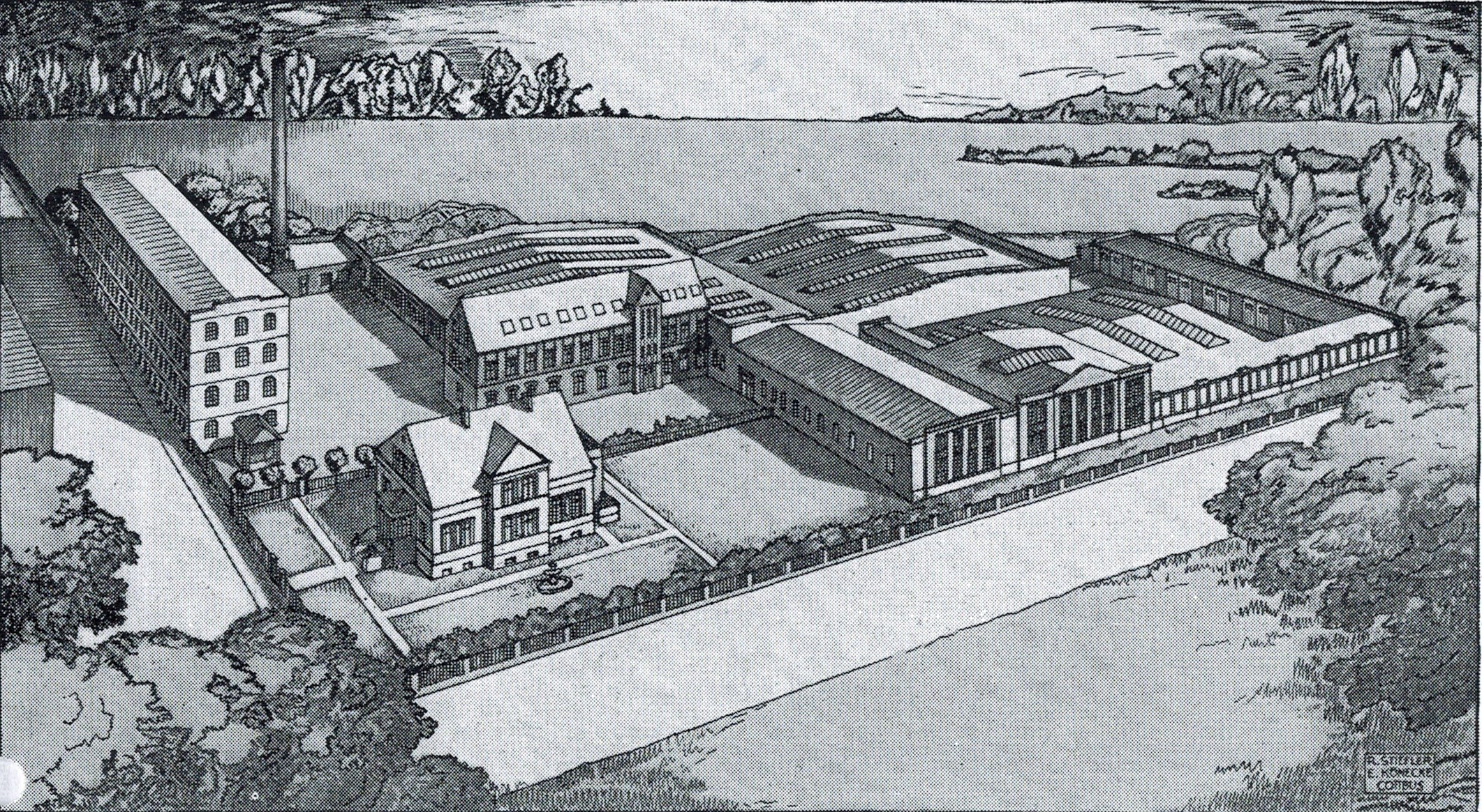 Fabrik Rottka, früher